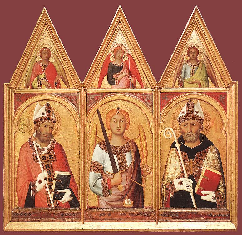 Polyptych